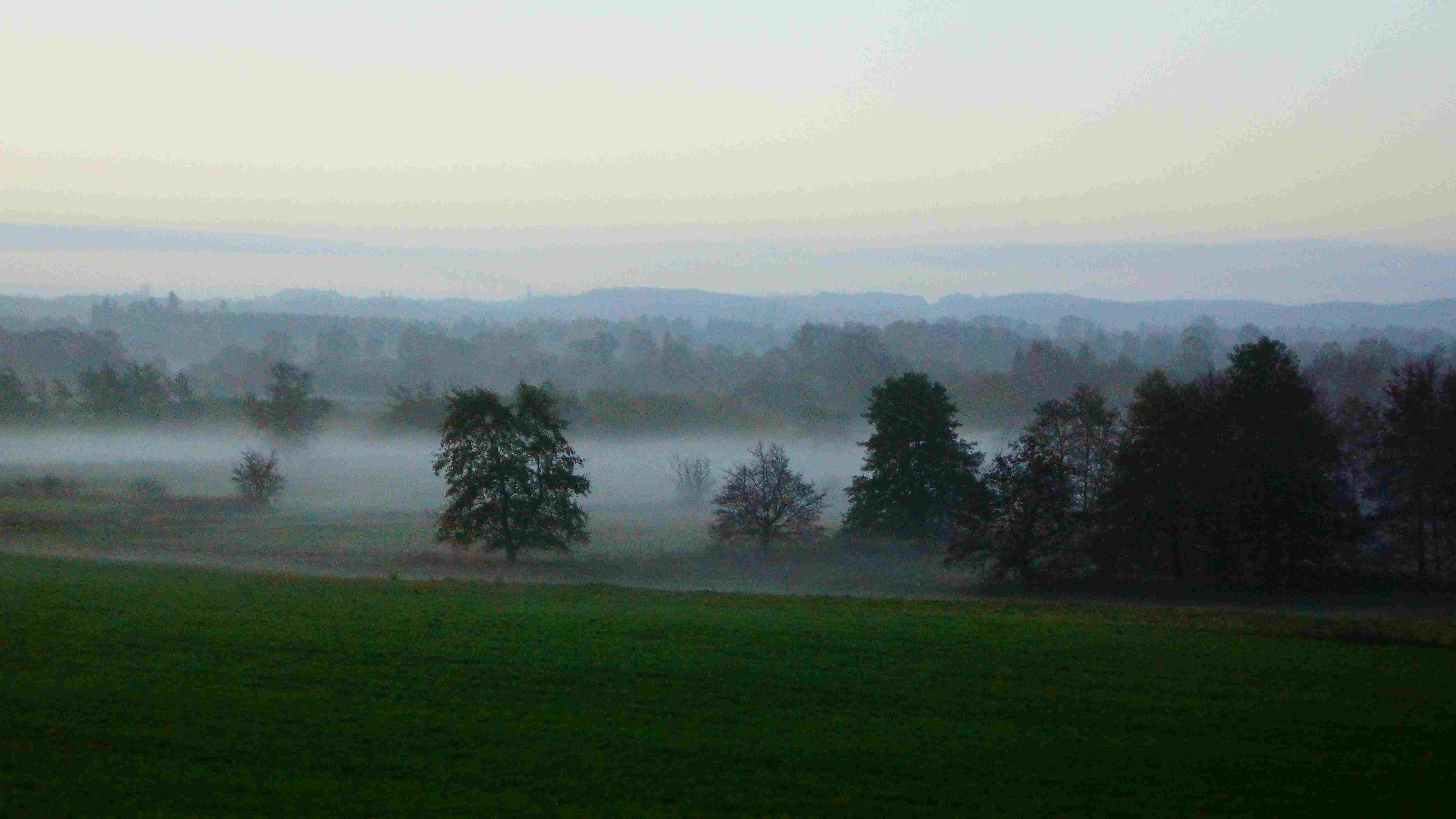 Mørke Mose